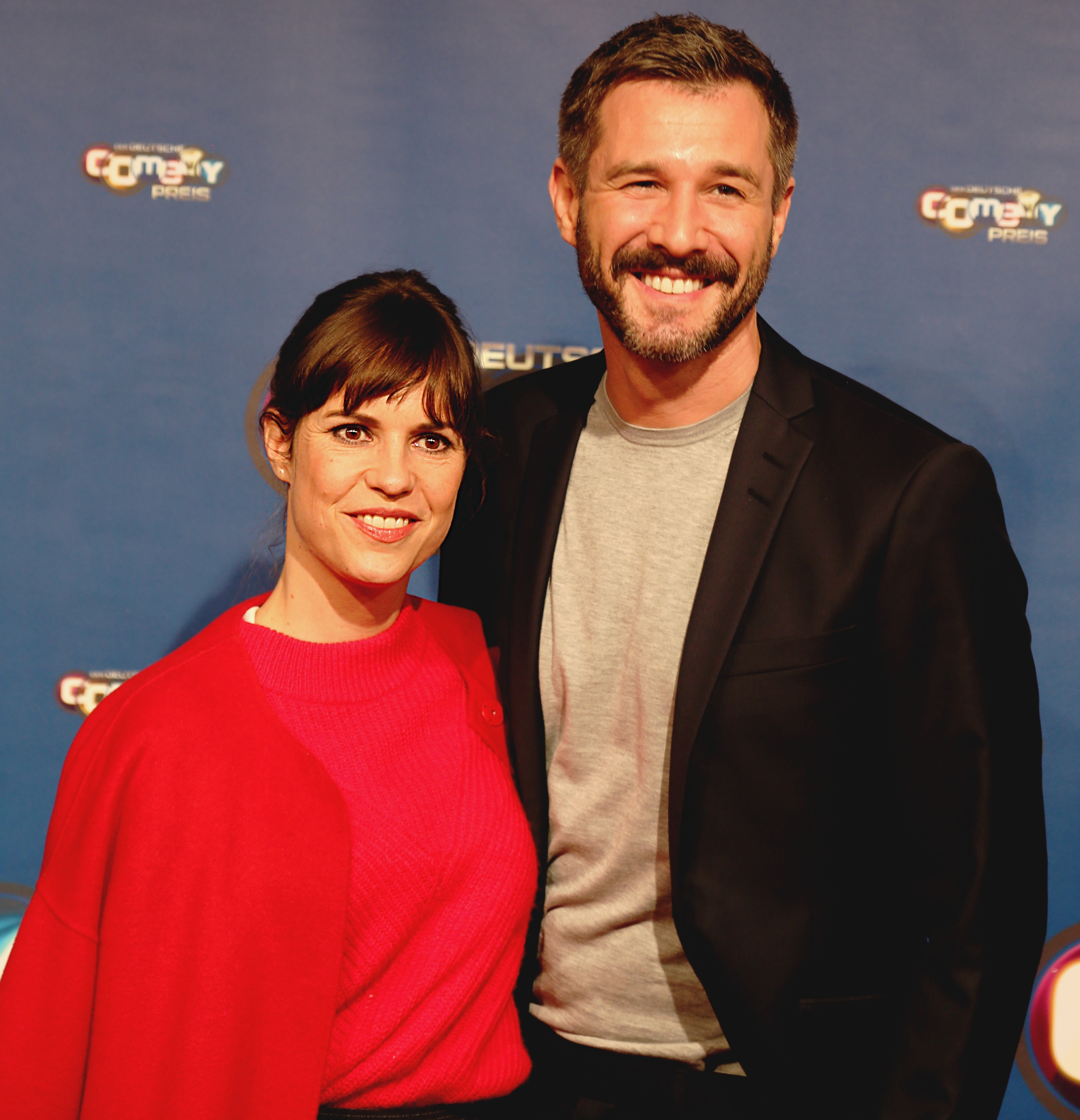 Birthe Wolter und Jochen Schropp beim Deutschen Comedypreis 2017.